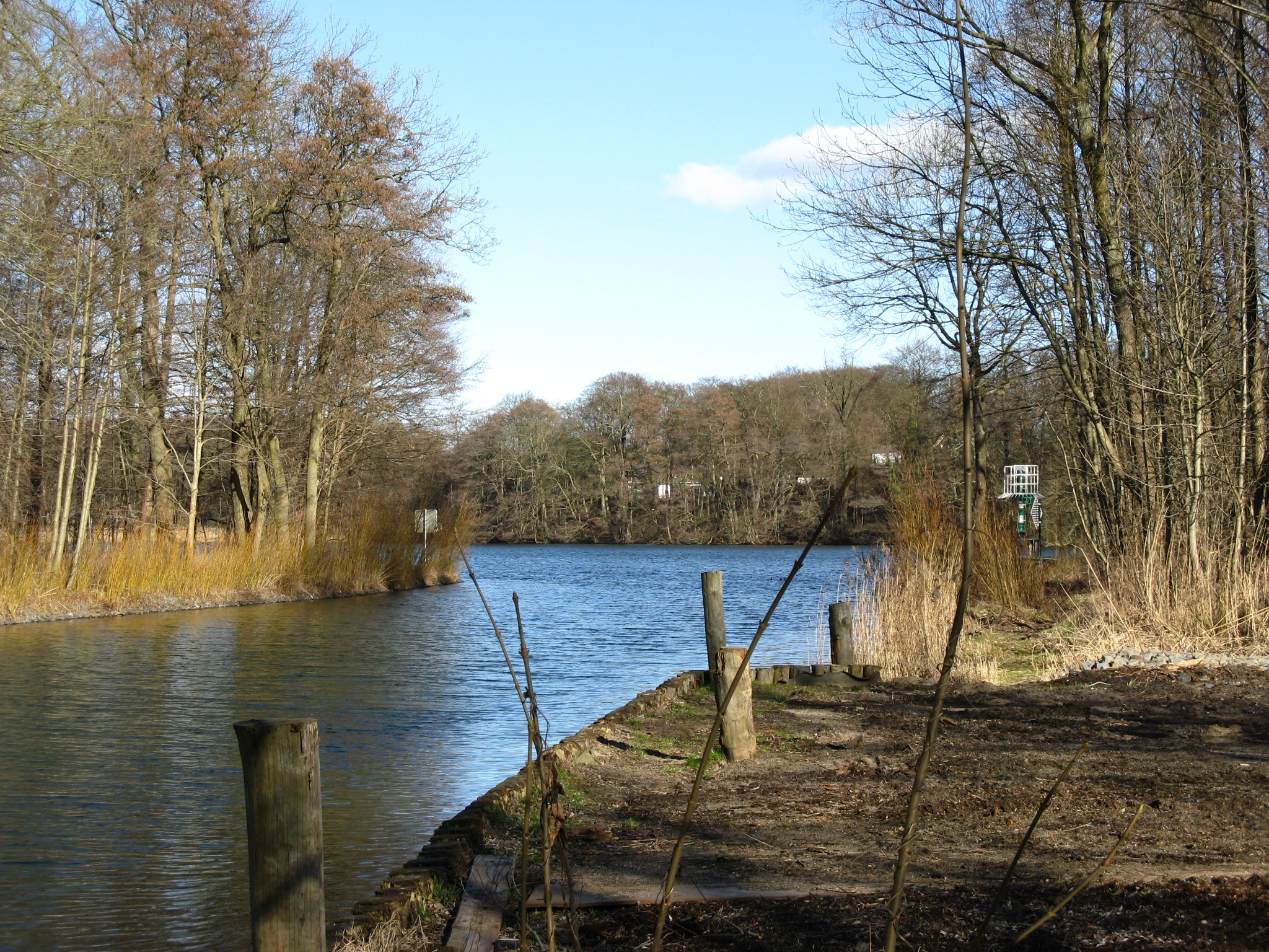 Beginn des Störkanals am Südufer des Schweriner Sees in Raben Steinfeld, Mecklenburg-Vorpommern